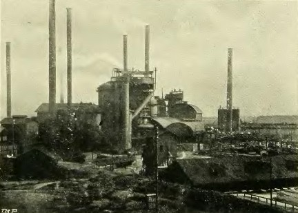 Huť Žofinka